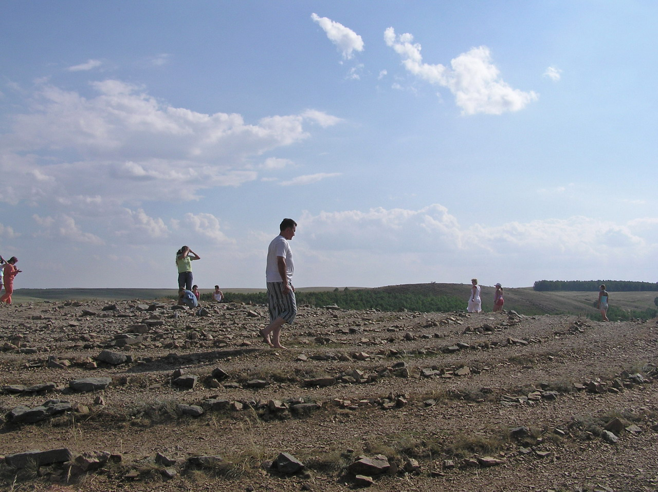 Аркаим Гора Шаманка